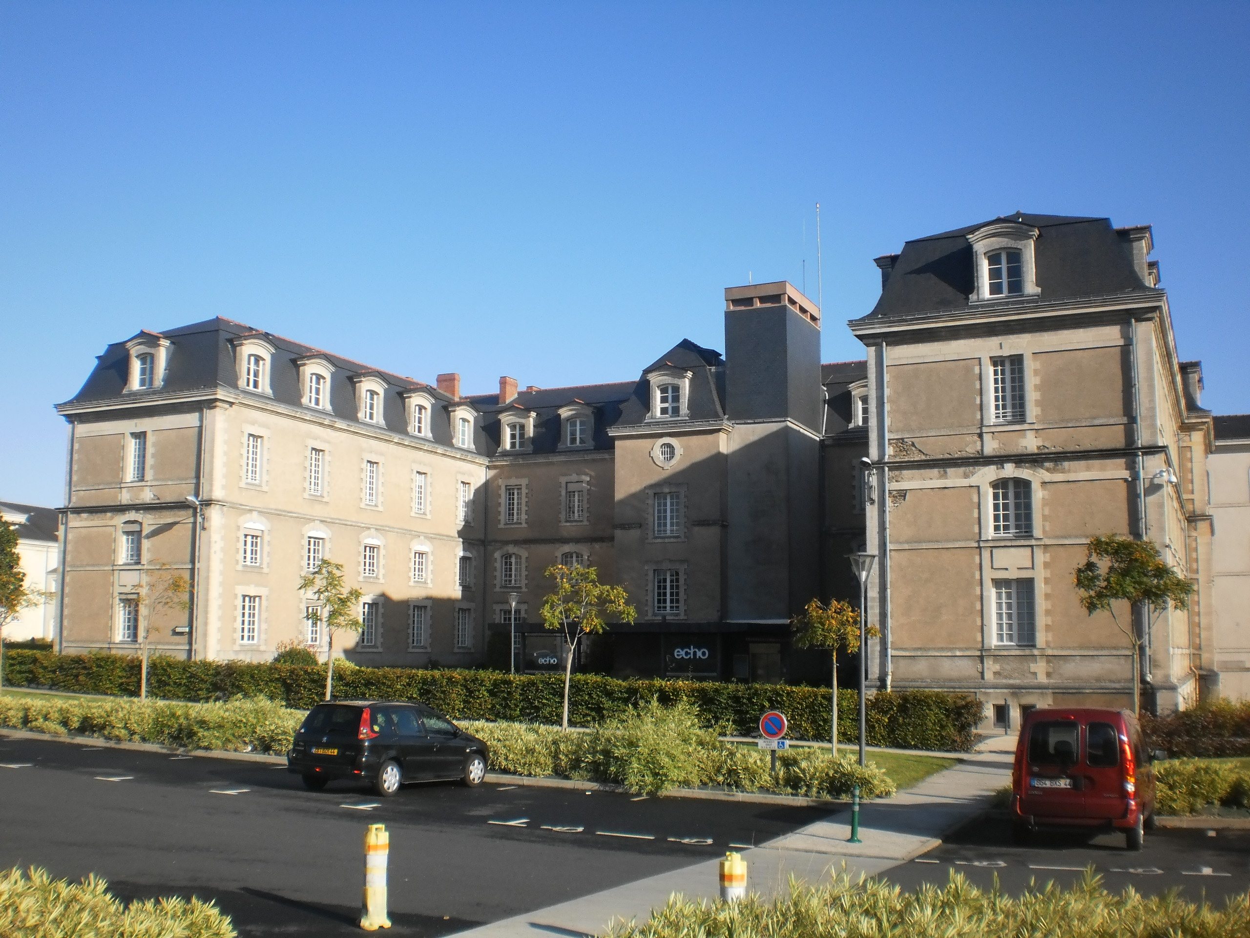 Pavillon Montfort de l'hôpital Saint-Jacques de Nantes (France)